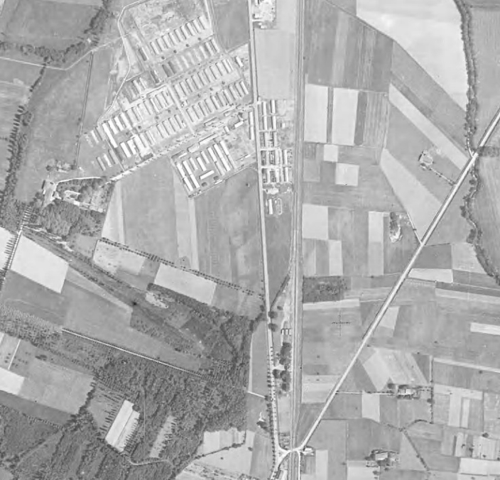 photo vue du ciel en 1945